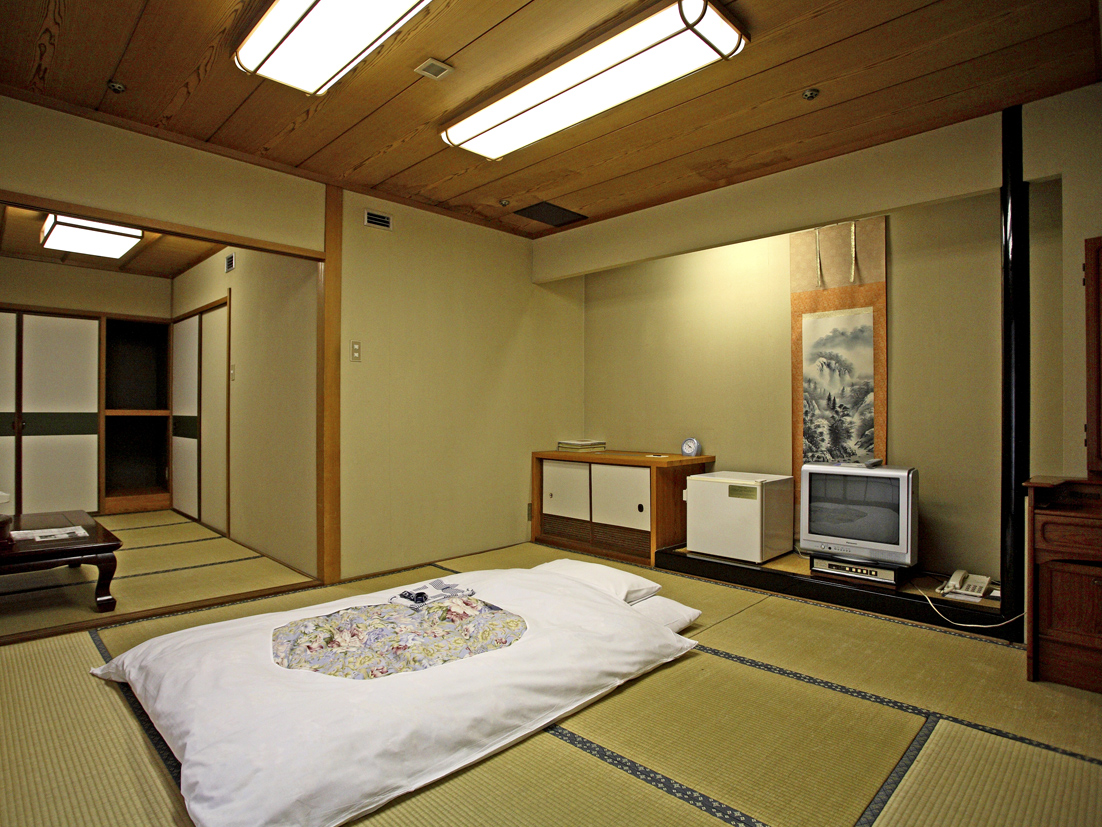 広島グランドインテリジェントホテルの和室